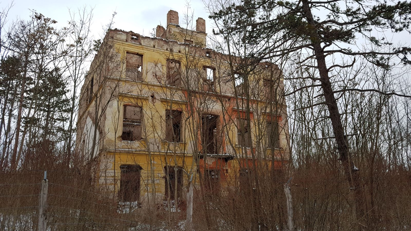 Herrenhaus